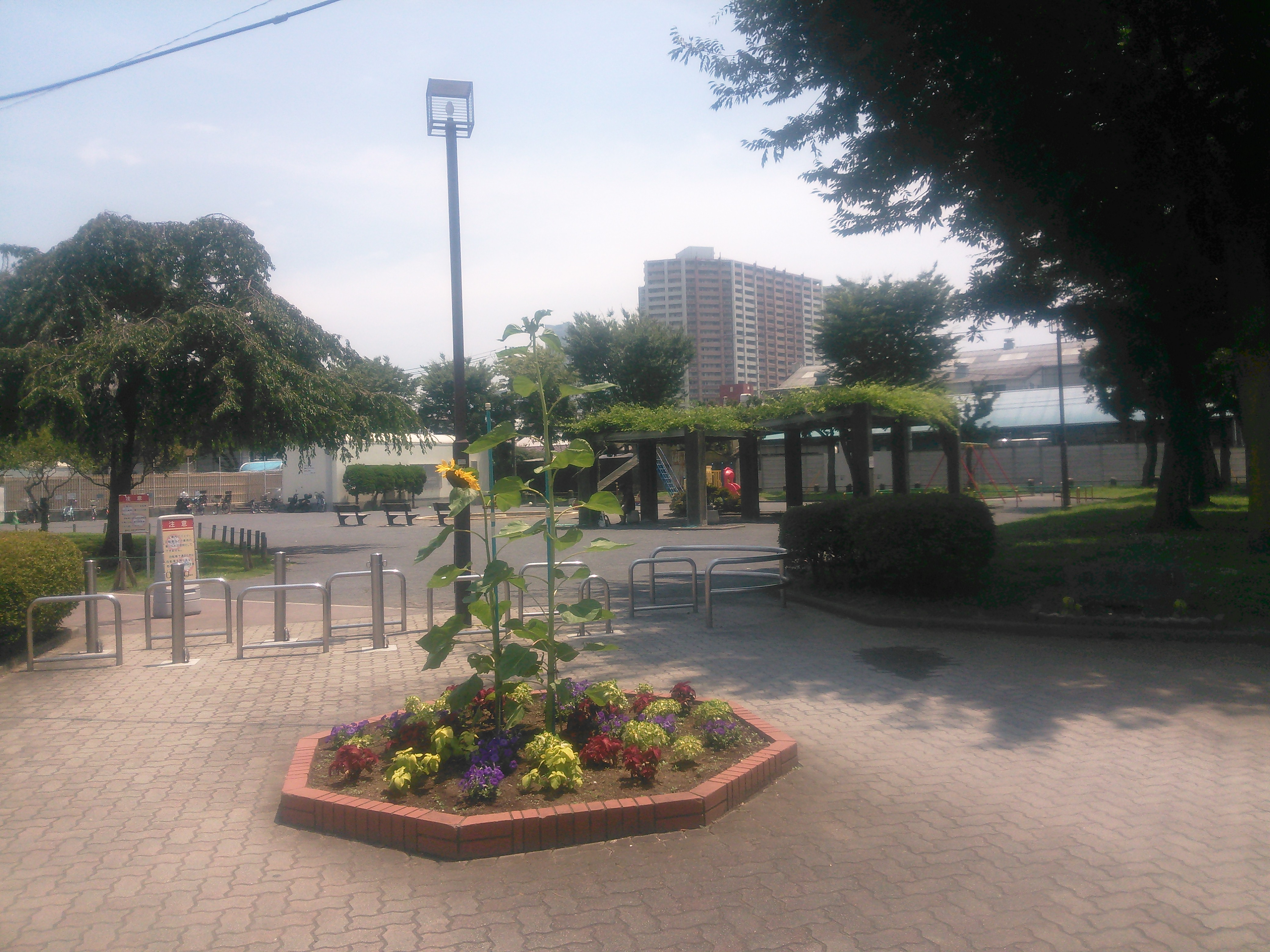 横浜市西区、岡野公園